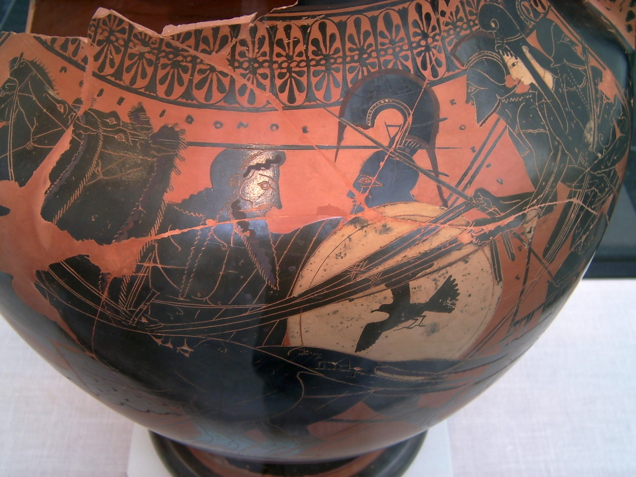 Vorderseite: Theseus raubt Antiope, Rückseite: Herakles würgt den nemäischen Löwen, attisch-schwarzfigurige Halsamphora der Leagros-Gruppe, um 510/500 v. Chr., Höhe 67 cm, gefunden in Vulci, Staatliche Antikensammlungen, Inventarnummer 1414